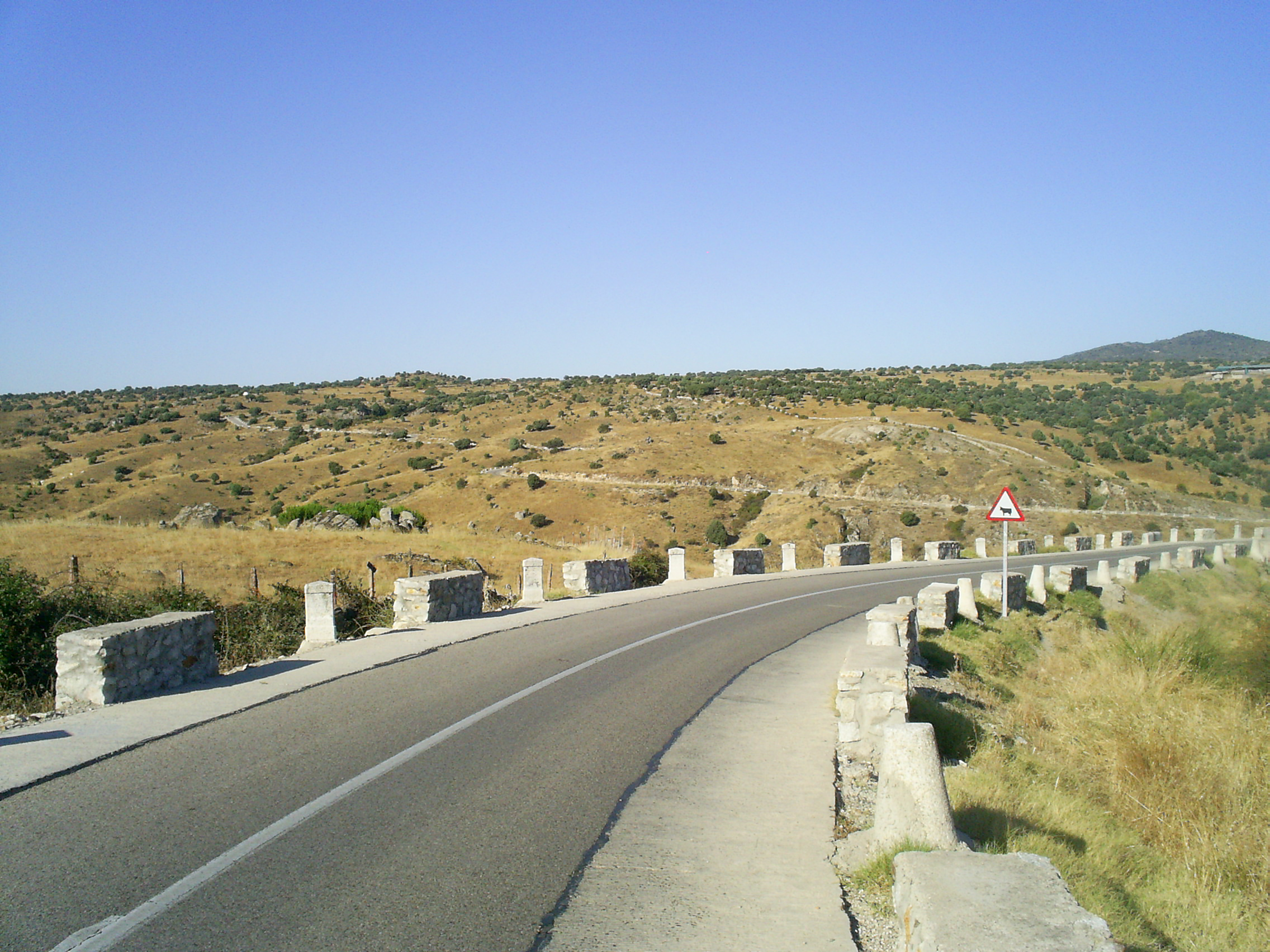 Road to Hoyo de Manzanares